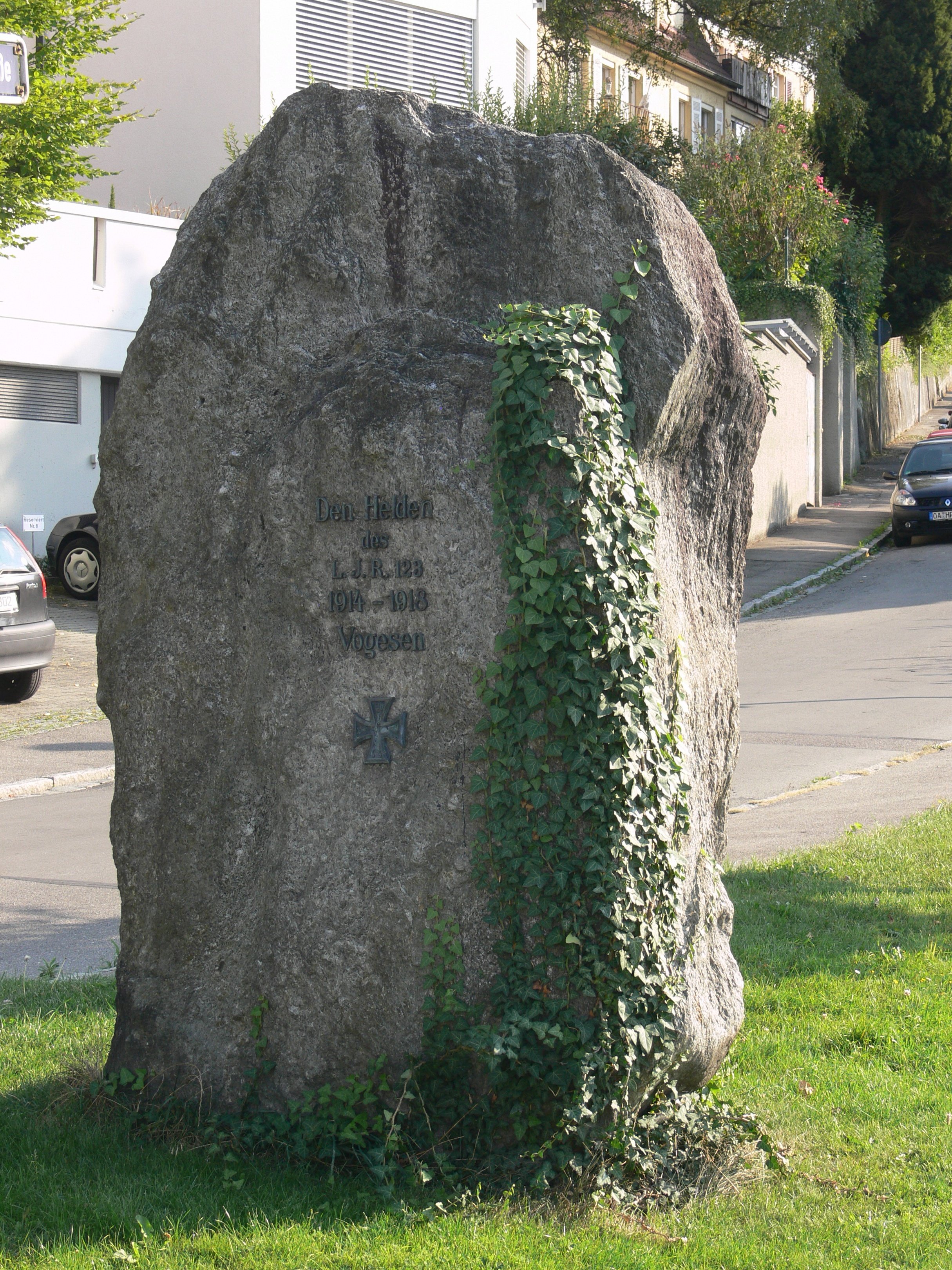 Ravensburg, Gedenkstein für das Württembergische Landwehr-Infanterie-Regiment 123 (Den Helden des L.J.R. 123 1914–1918 Vogesen) an der Gabelung Federburgstraße/Urbanstraße